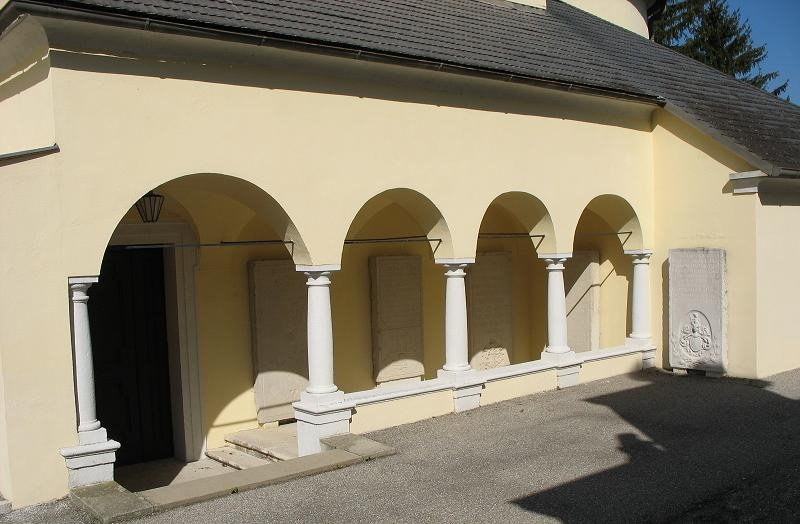 Kaisersteinbruch_Arkadengang